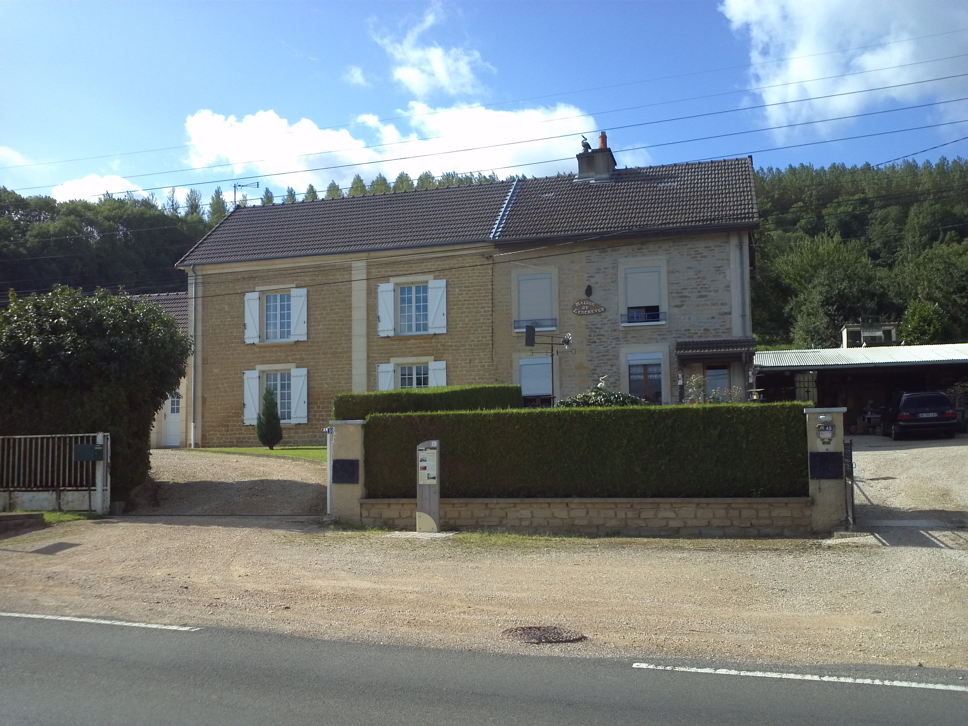 Maison du tisserand à Donchery (sud-ouest de Sedan, France), située sur le bord de la route nationale, où a eu lieu l'entrevue de Napoléon III et de Bismark pour discuter les préliminaires de la capitulation de Sedan (2 septembre 1870).